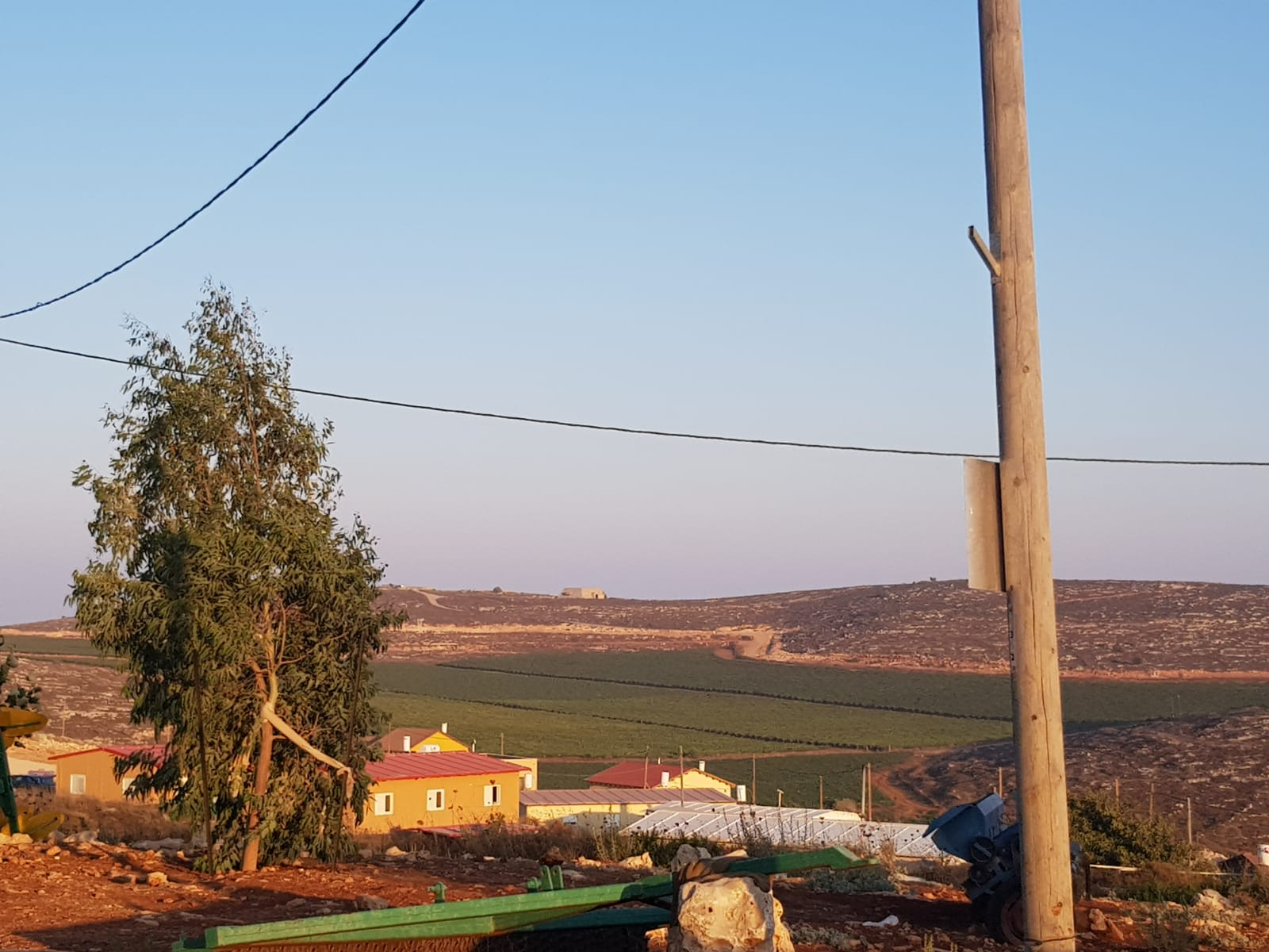 נוף טיפוסי